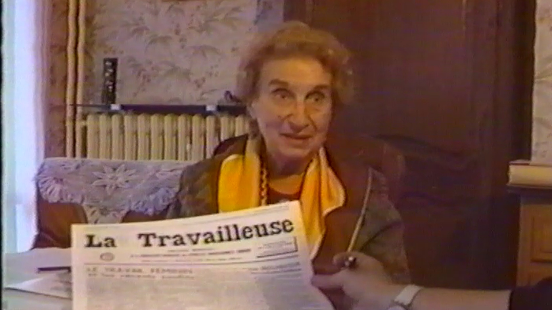 Entretien téléchargeable sur